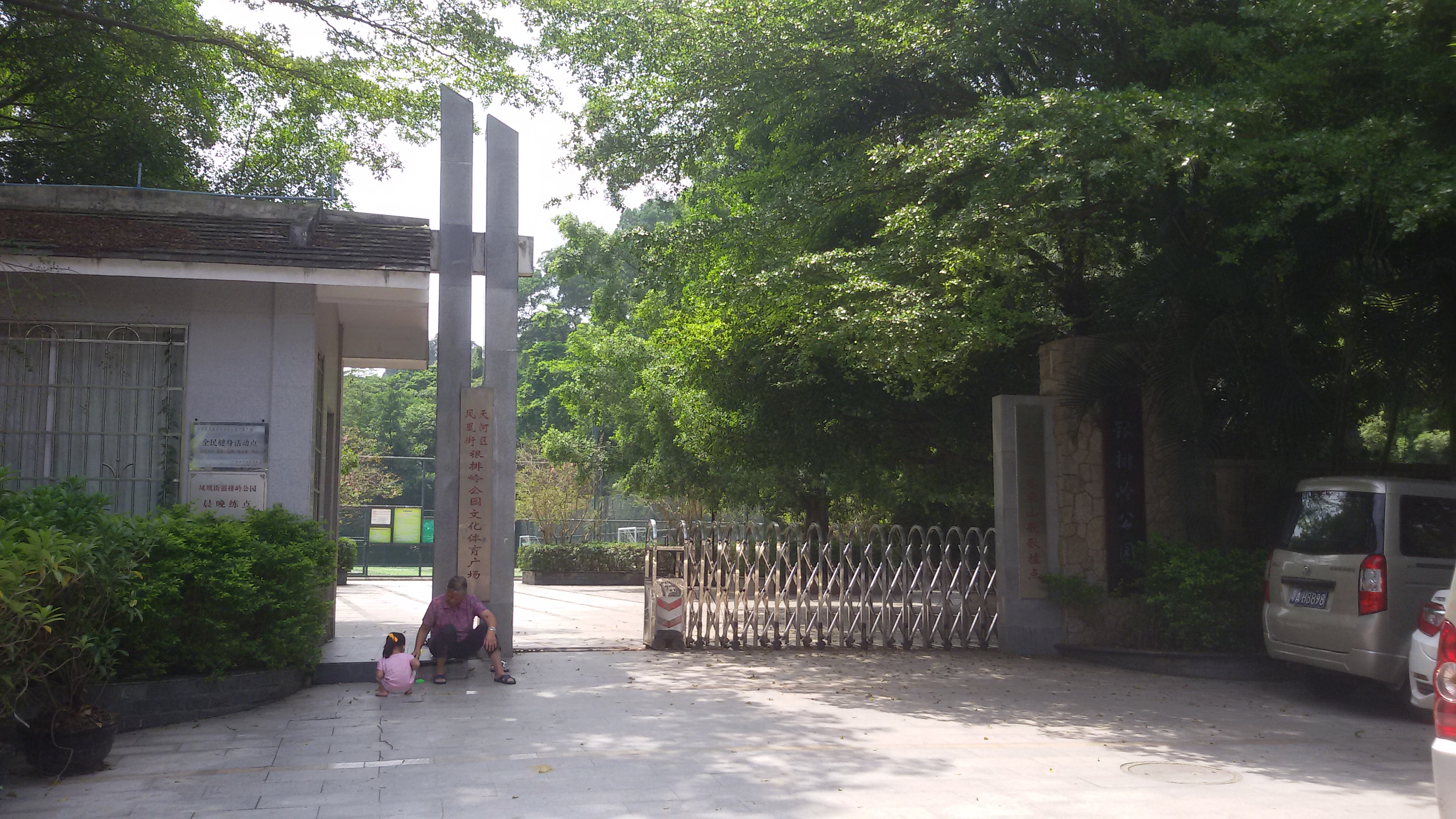 粵語: 銀排嶺公園正门